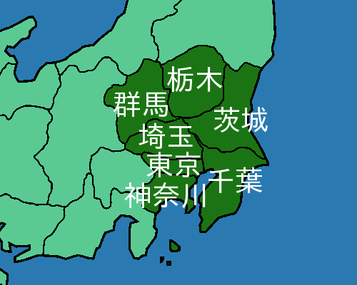 関東地方の自治体